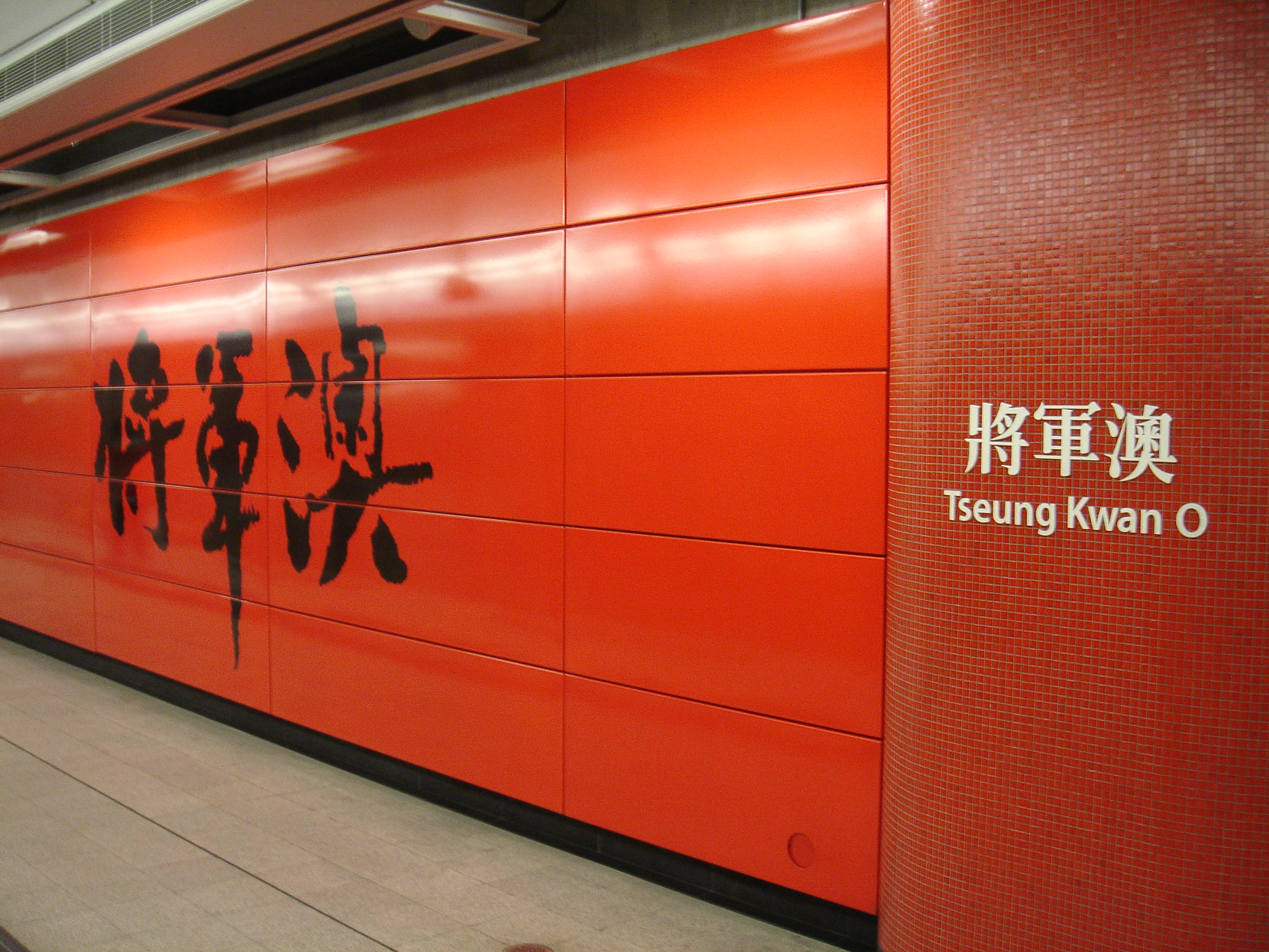 Tseung Kwan O (將軍澳), Platform/Station Livery, Tseung Kwan O Line, MTR Hong Kong.